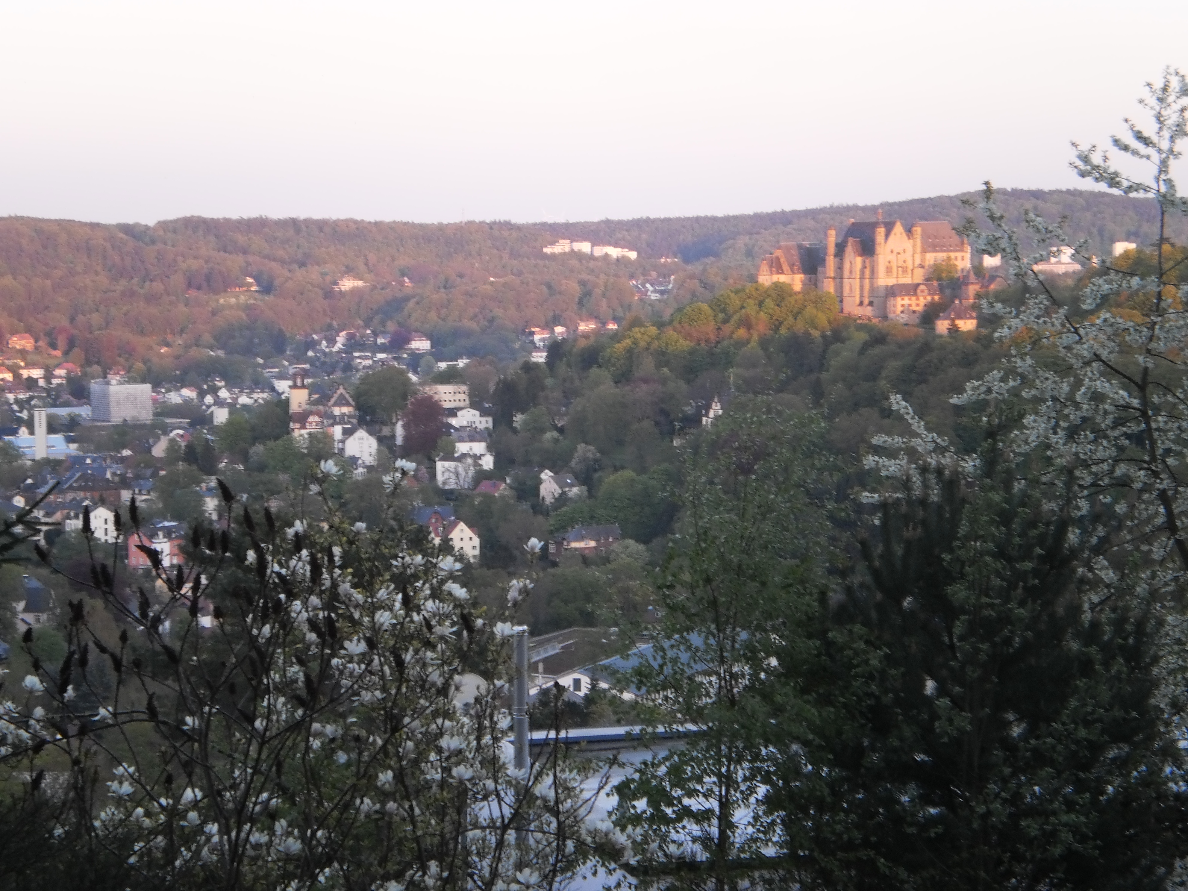 Das Marburger Schloss (rechts oben in der Abendsonne) und die Innenstadt der Universitätsstadt Marburg (im Tal an der Lahn links unten) im hessischen Frühjahr 2016. Im Vordergrund liegt das Stadtviertel Grassenberg, nördlich des Schlossbergs und der Straße Ketzerbach, links im Bild ist der Silberwürfel der Universitätsbibliothek (Philipps-Universität) zu sehen, dahinter die Lahnberge. Foto von der Elsenhöhe nahe Emil-von-Behring's Pavillon mit Blick aufs Lahntal, aufgenommen am 5. Mai 2016.